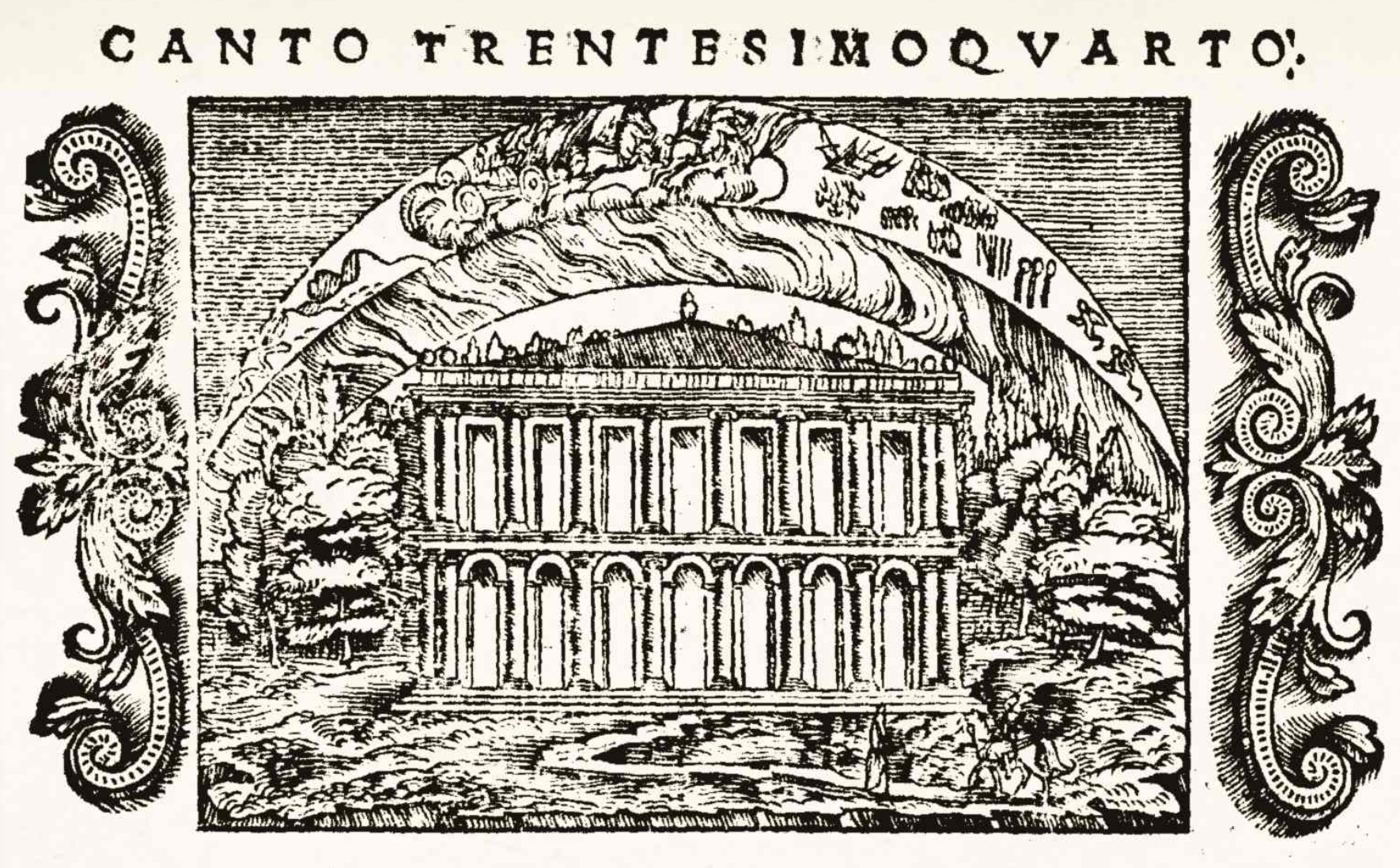 Illustrazione del XXXIV canto dell'Orlando Furioso di Ariosto in un'edizione di Clemente Valvassori stampata a Venezia nel 1553, che raffigura il viaggio di Astolfo sulla Luna